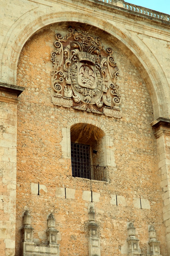 Medallón en la fachada de la Catedral de San Ildefonso, en Mérida, Yucatán, México